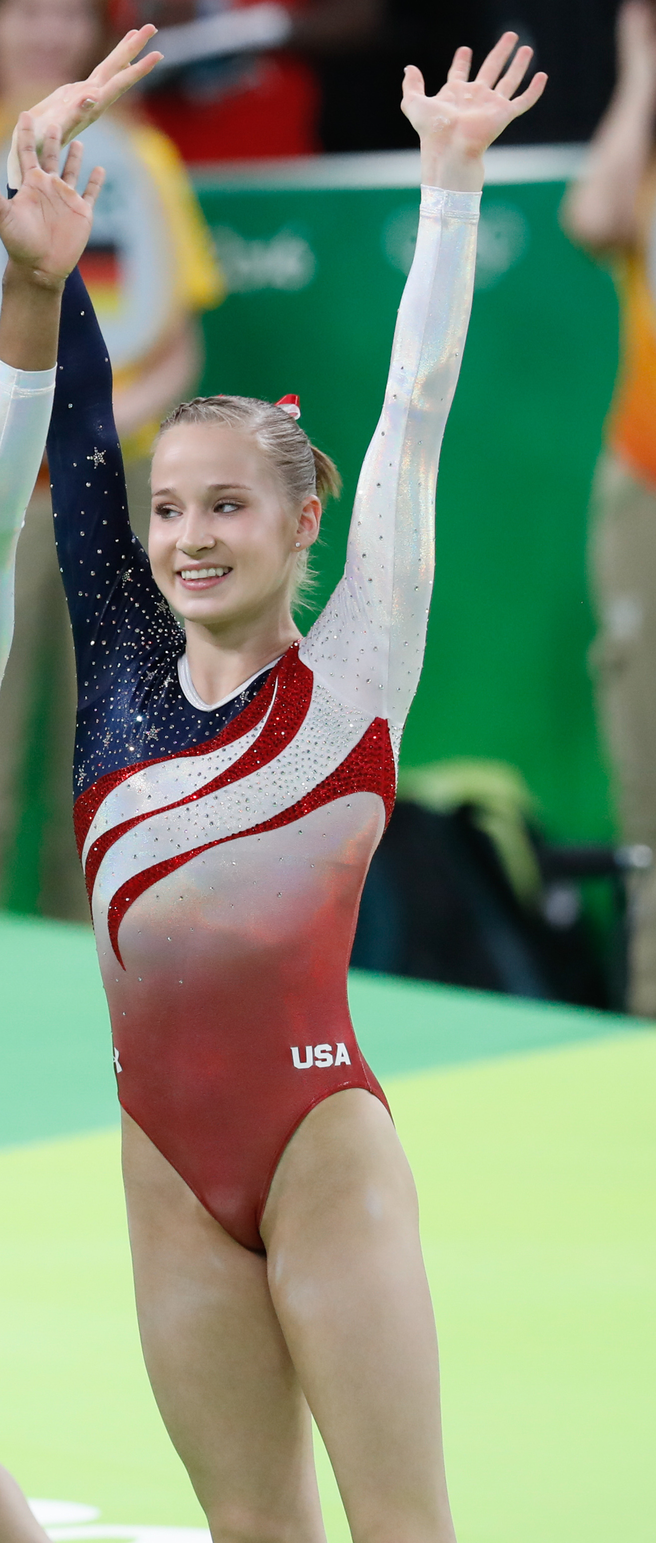 Rio de Janeiro - Ginastas dos Estados Unidos comemoram medalha de ouro na disputa por equipes feminina nos Jogos Olímpicos Rio 2016. (Fernando Frazão/Agência Brasil)